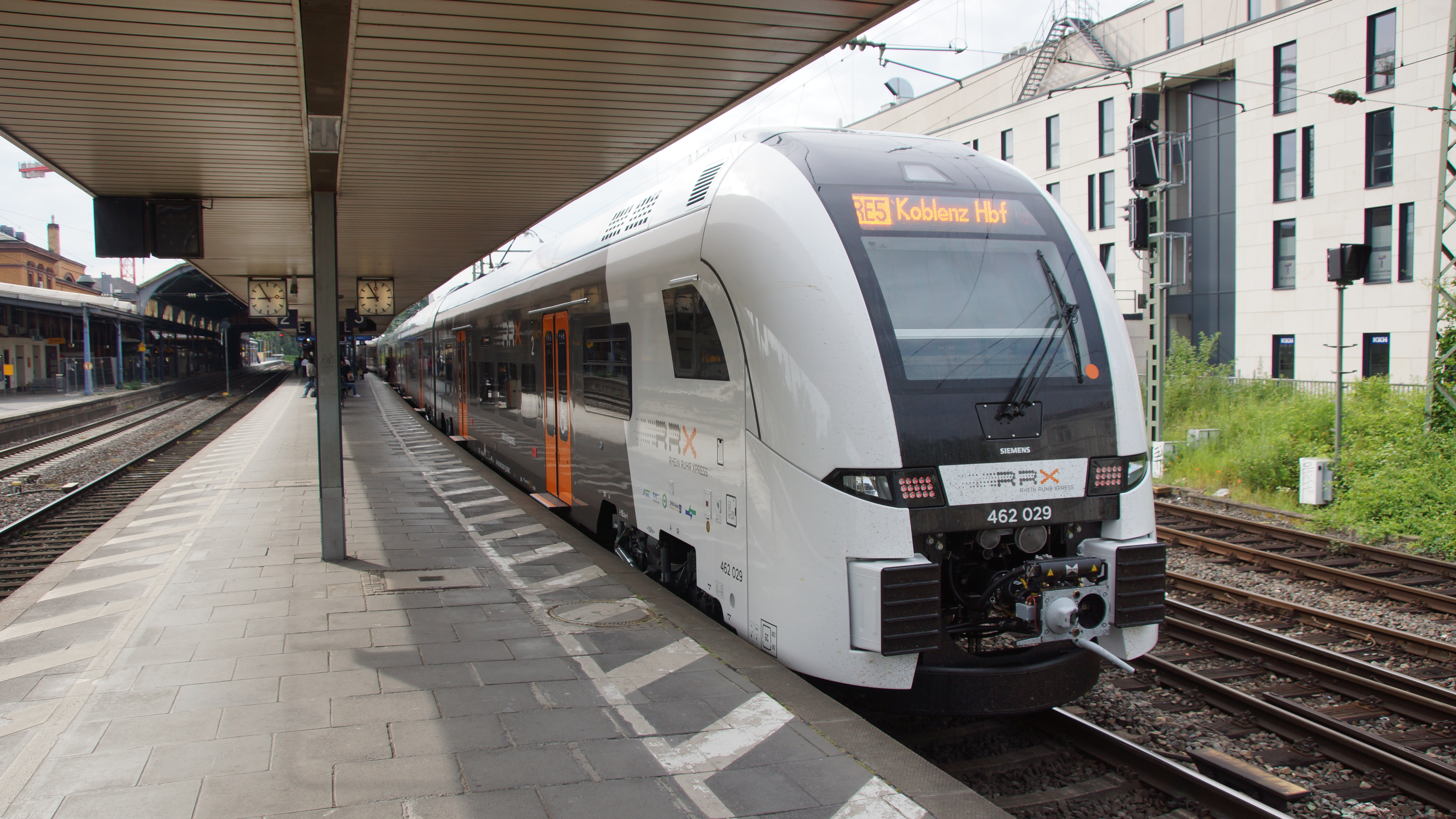 Bonn Hauptbahnhof Gleis 3 mit Ausfahrt RRX-Zug RE5 Rhein-Express, Siemens Desiro HC 462023 und 462029, Richtung Koblenz